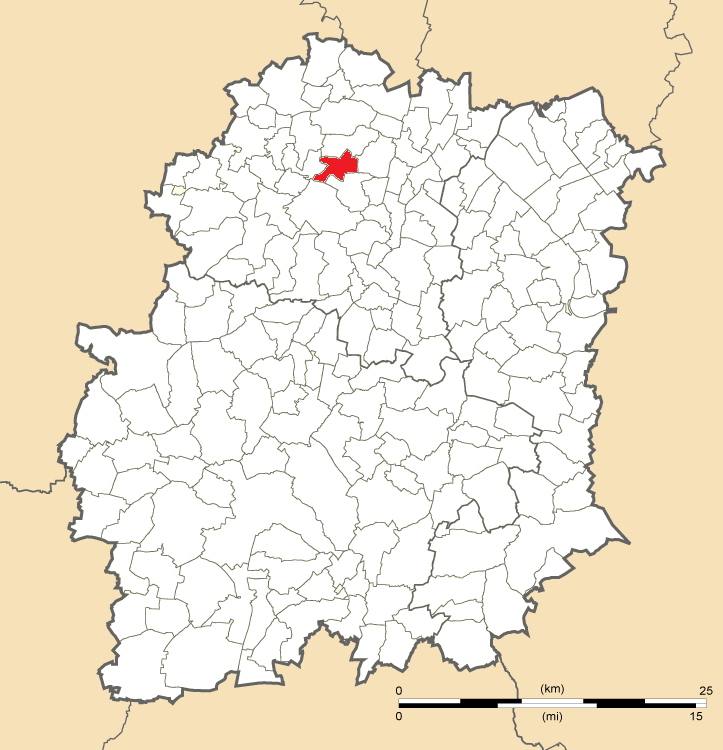 Carte de position de Villejust en Essonne